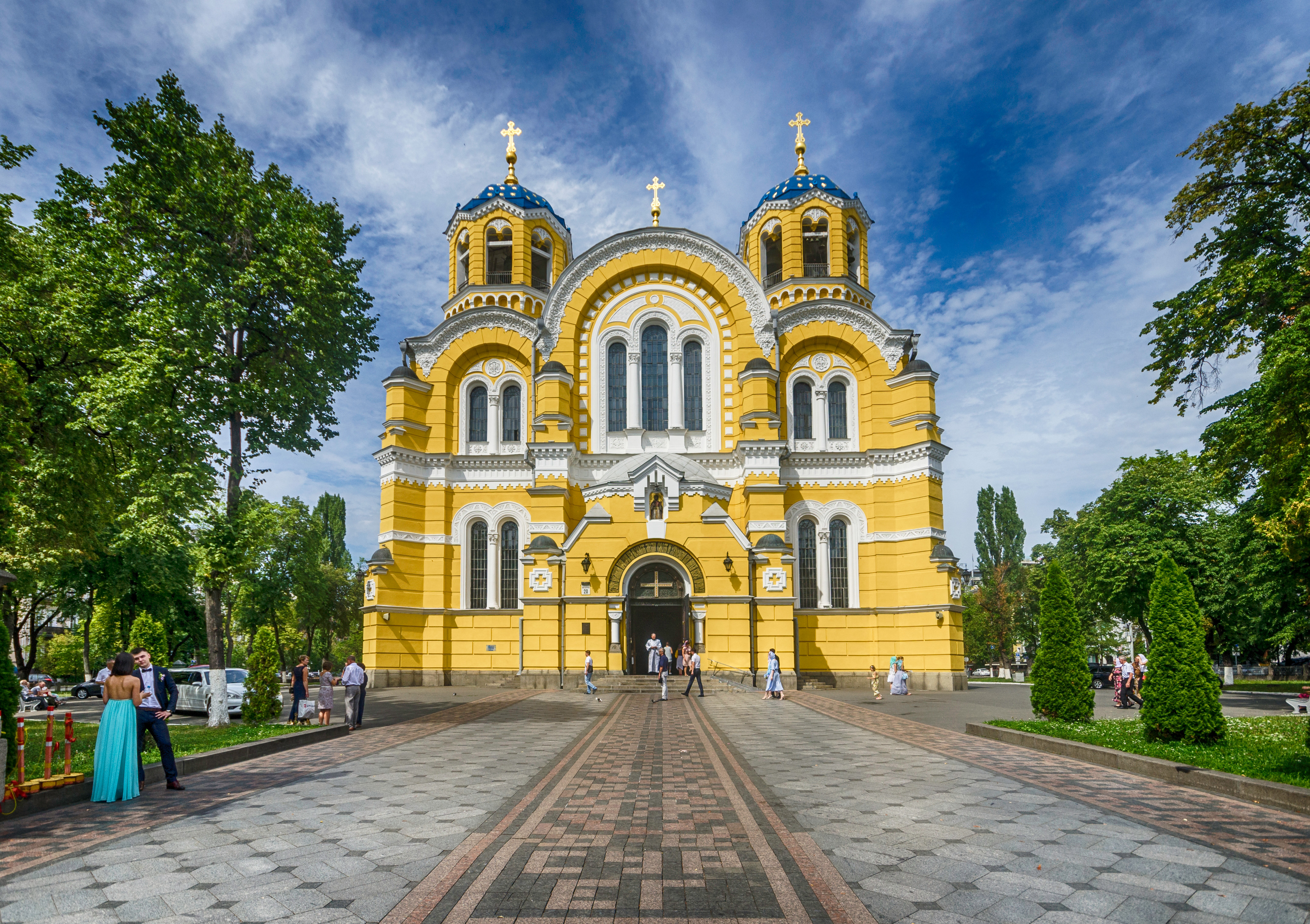 Собор Володимирський, Київ, Шевченка Тараса бульв., 20